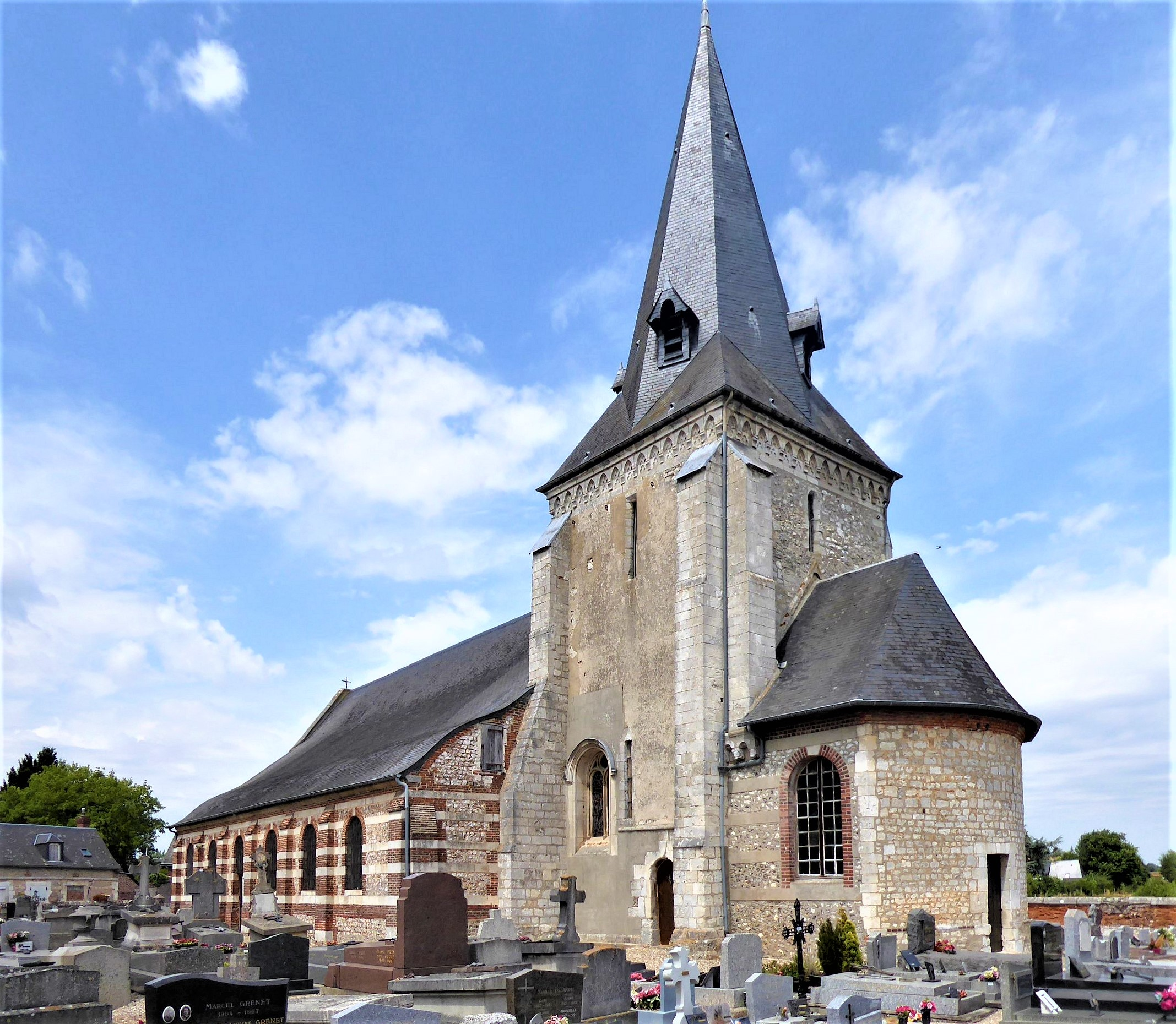 Église Saint-Pierre de Bourneville